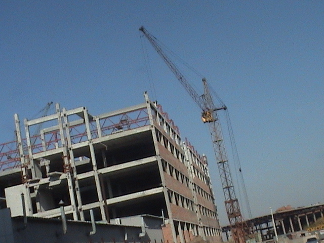 КБ-402 - на строительстве ТЦ Горский - 5ти этажная секция